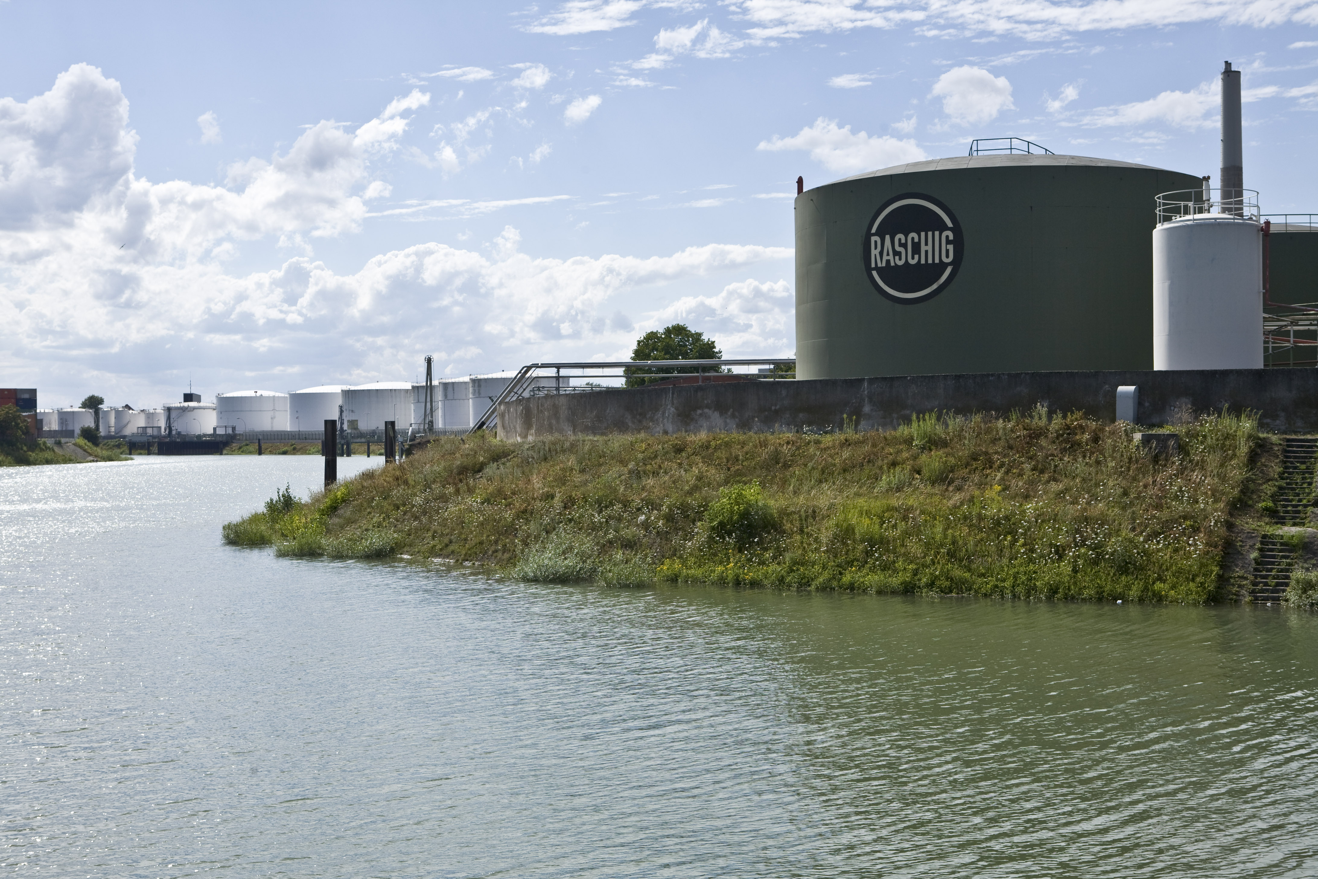 Rheinufer auf der Parkinsel Ludwigshafen. Blick auf das Werksgelände der Raschig.